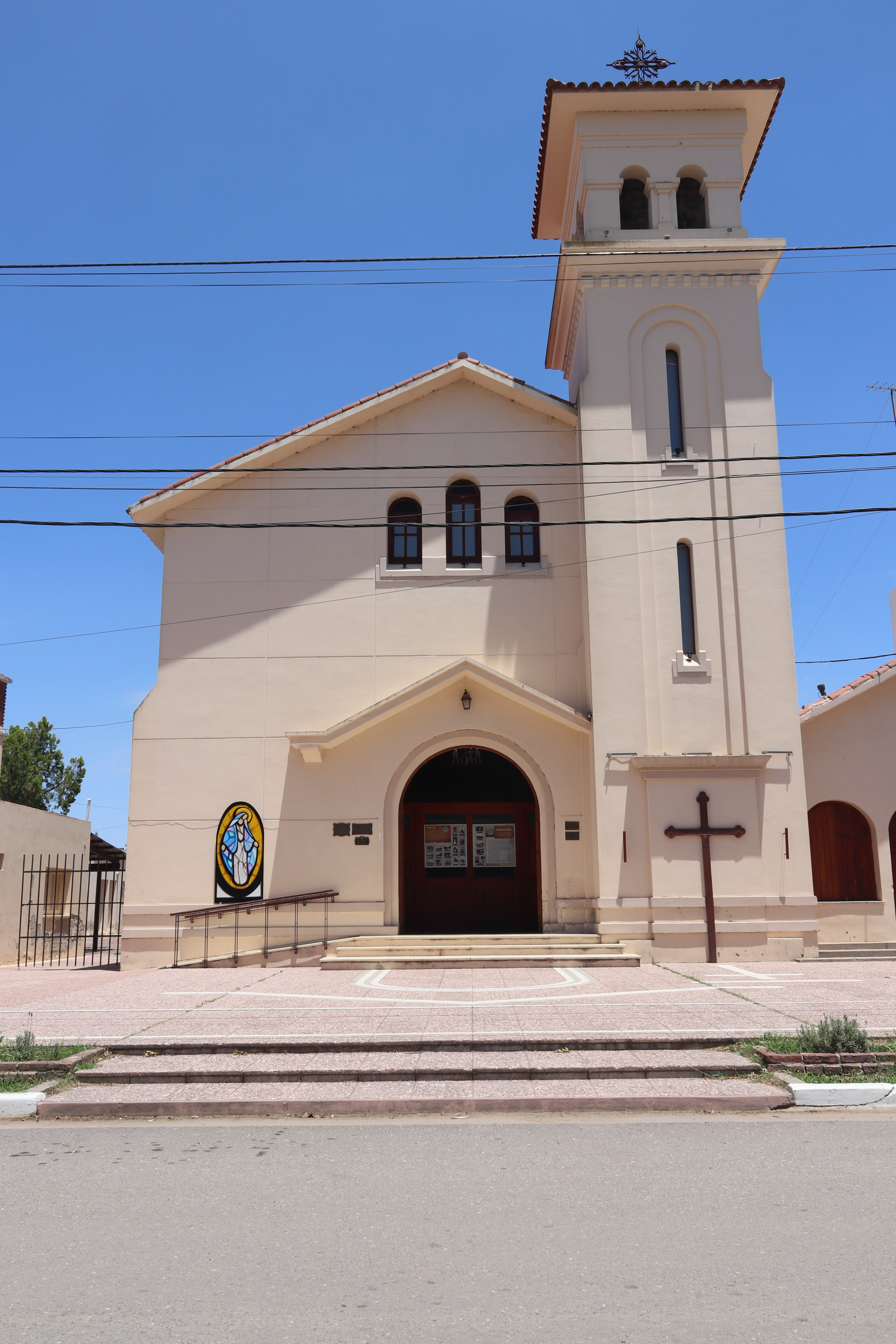 La Para